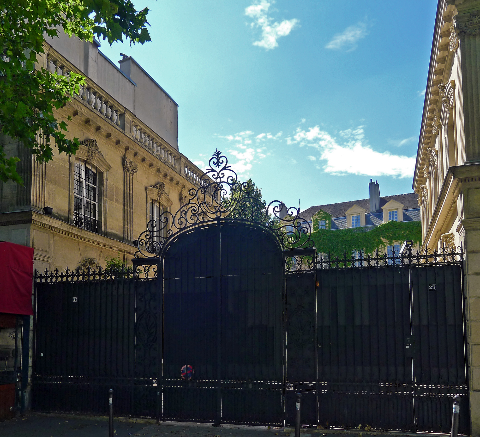 Hôtel de Sagonne vu depuis le boulevard Beaumarchais (n°23) - Paris IV .